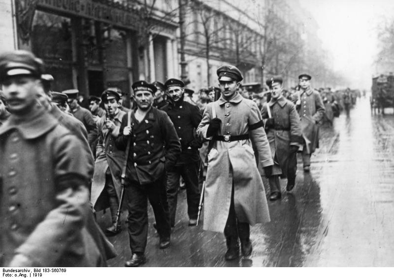 Berlin, Revolution Zentralbild Revolution 1918/19 in Deutschland Berlin 1919 Konterrevolutionäre Truppen unter dem Befehl von Oberst Wilhelm Reinhard in der Straße "Unter den Linden". 823-19